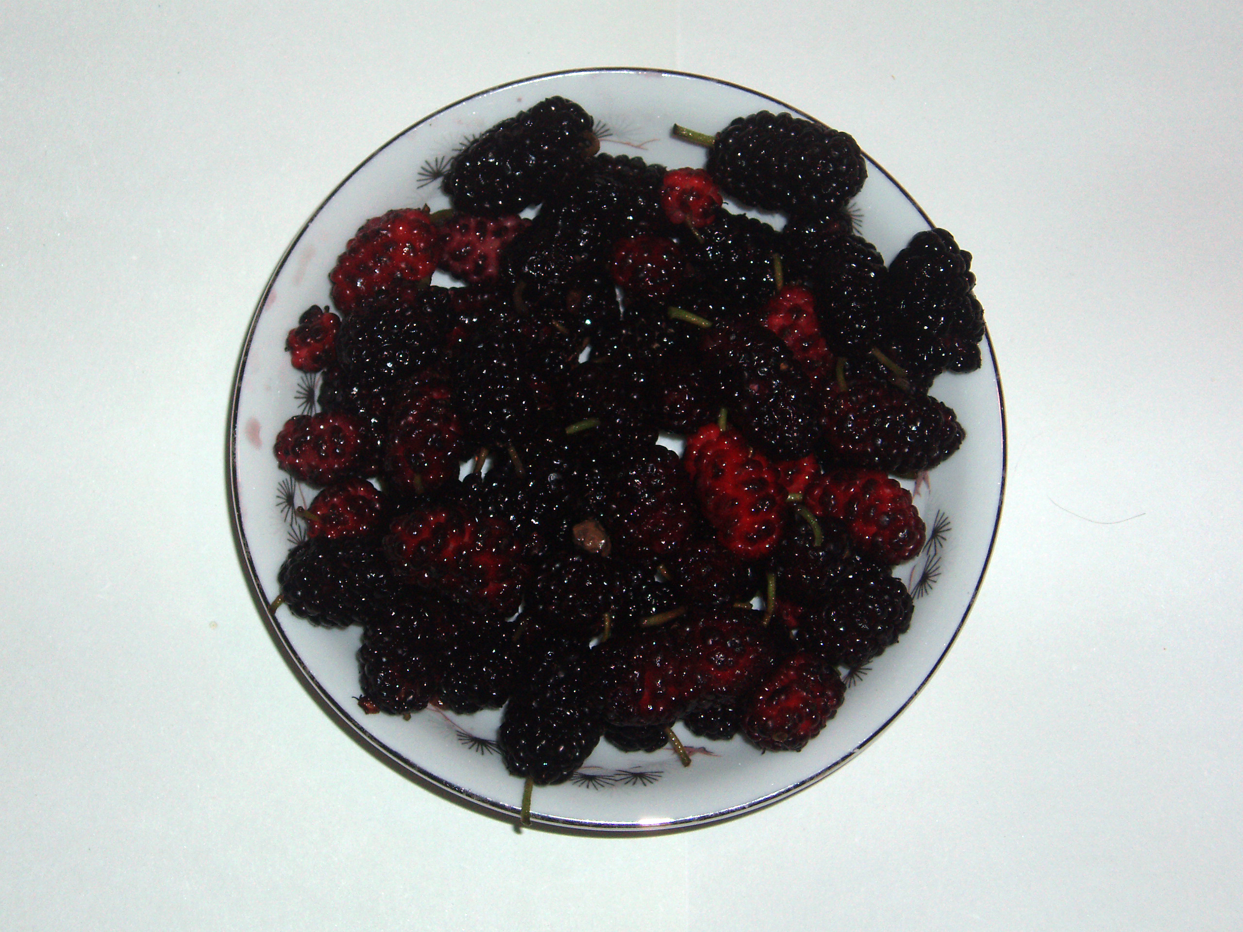 Mulberries